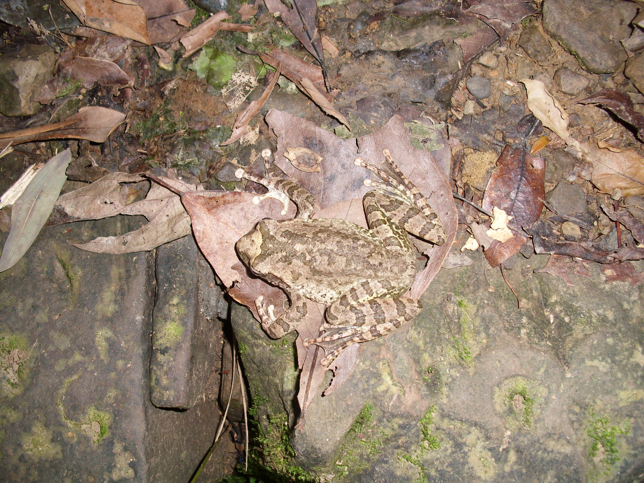 中文（台灣）: 褐樹蛙（母），學名：Buergeria robusta，拍攝於銀河洞越嶺登山步道。